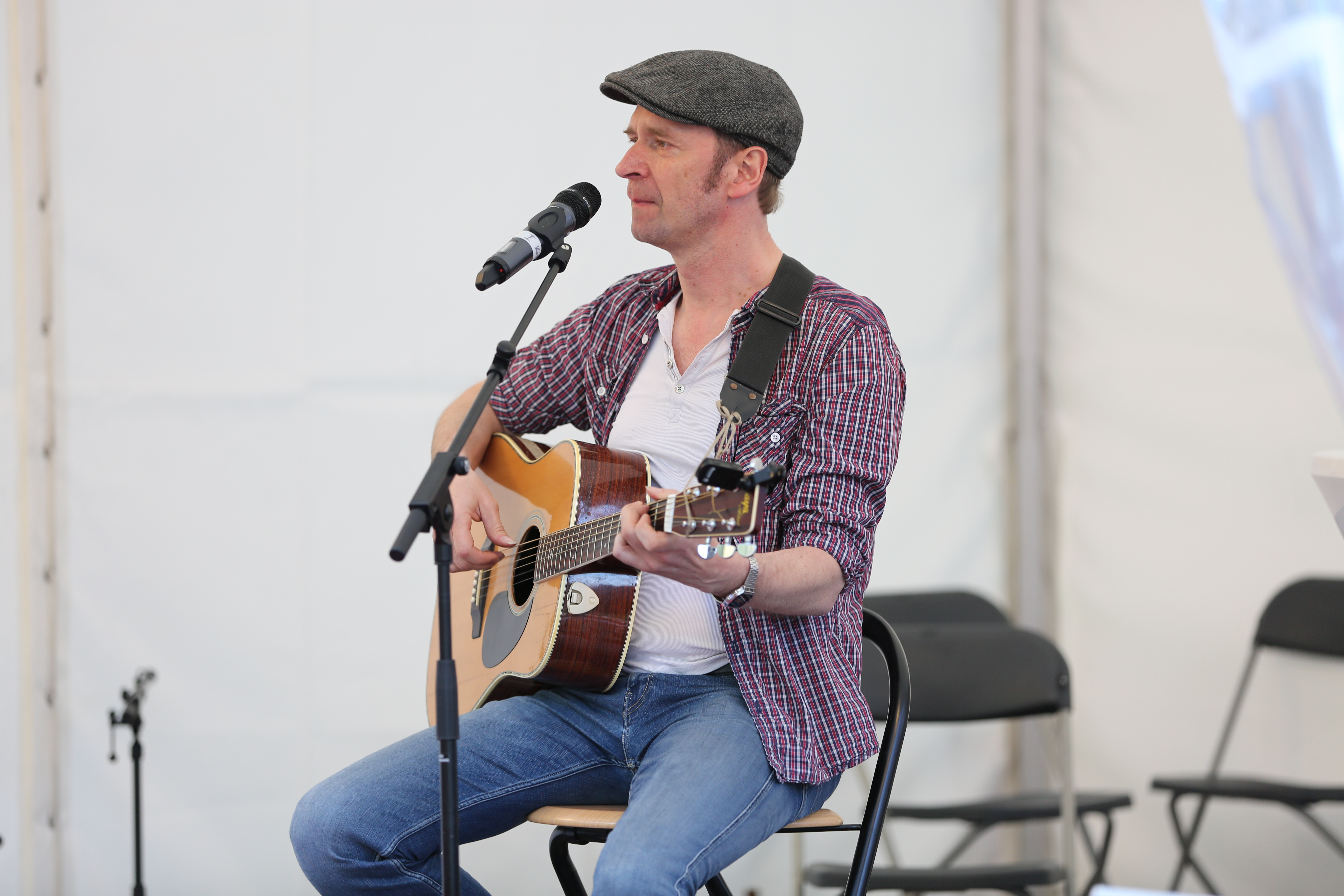 Ecco diLorenzo (Ecco Meineke) auf dem Corso Leopold, Mai 2017